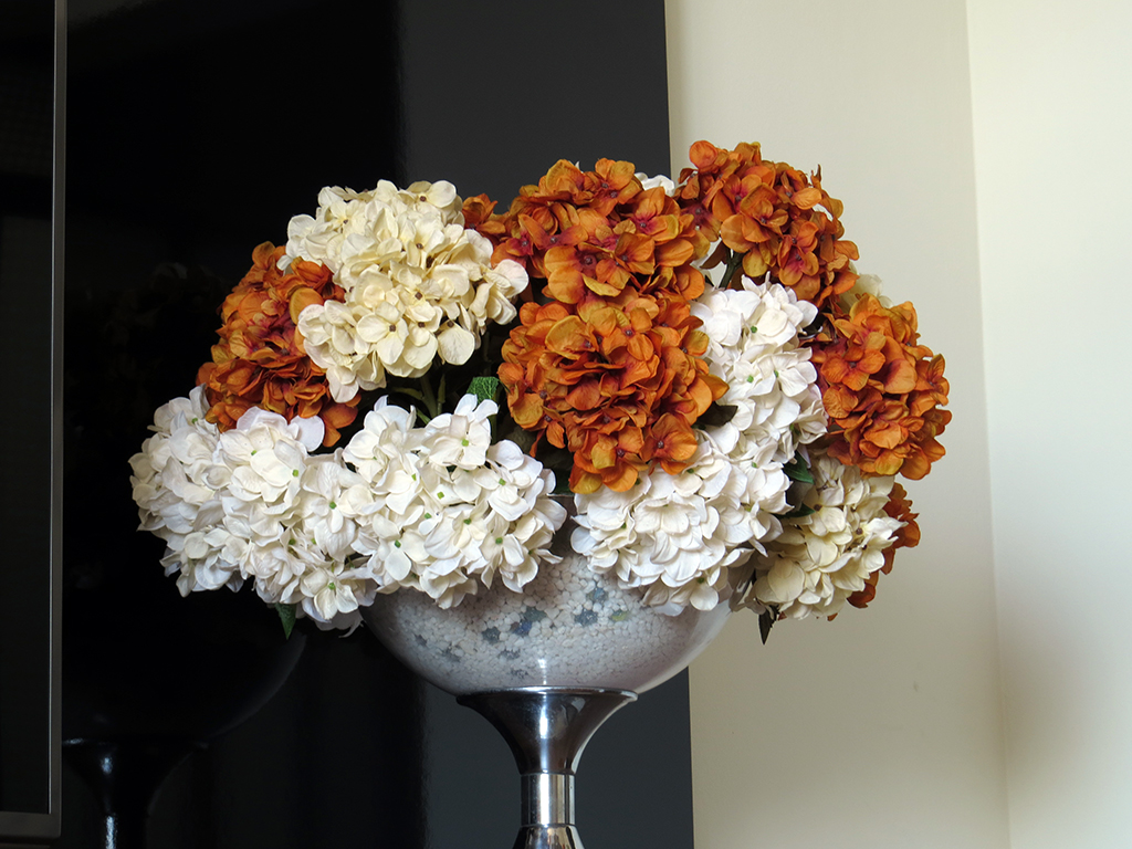 Imagem colorida